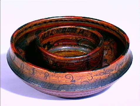 Varaskål fra Telemark. Nå i Norsk Folkemuseum i Oslo. Diameter 28 cm. NF.1906-0447.